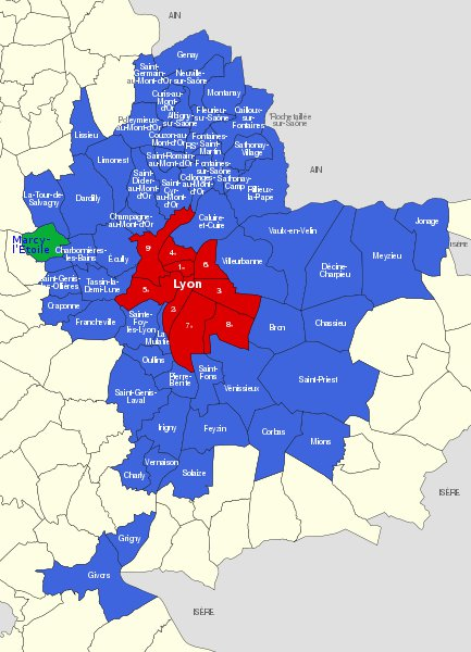 Communes du Grand Lyon, en vert Marcy-l'Etoile